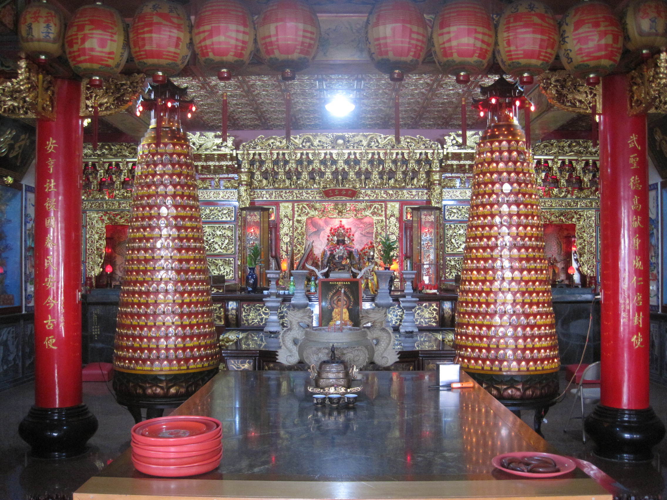 中文（台灣）: 新化武安宮正殿